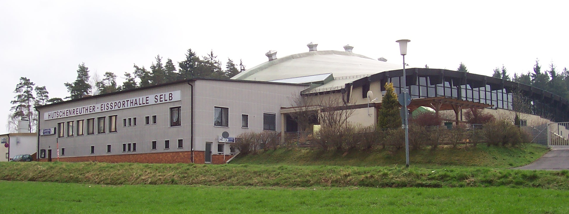 Eishalle Selb